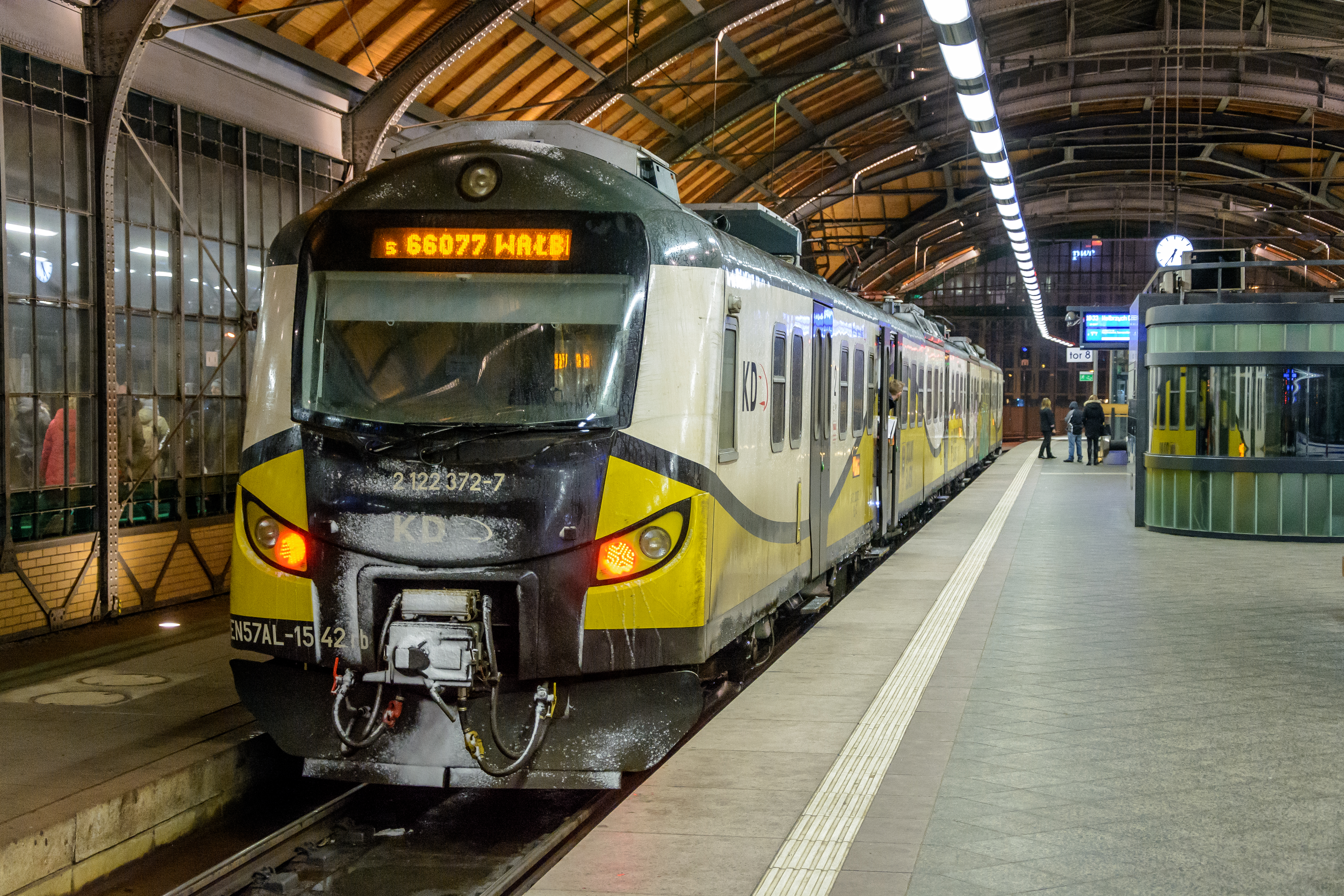 Elektryczny zespół trakcyjny EN57AL-1542 stoi na stacji Wrocław Główny.